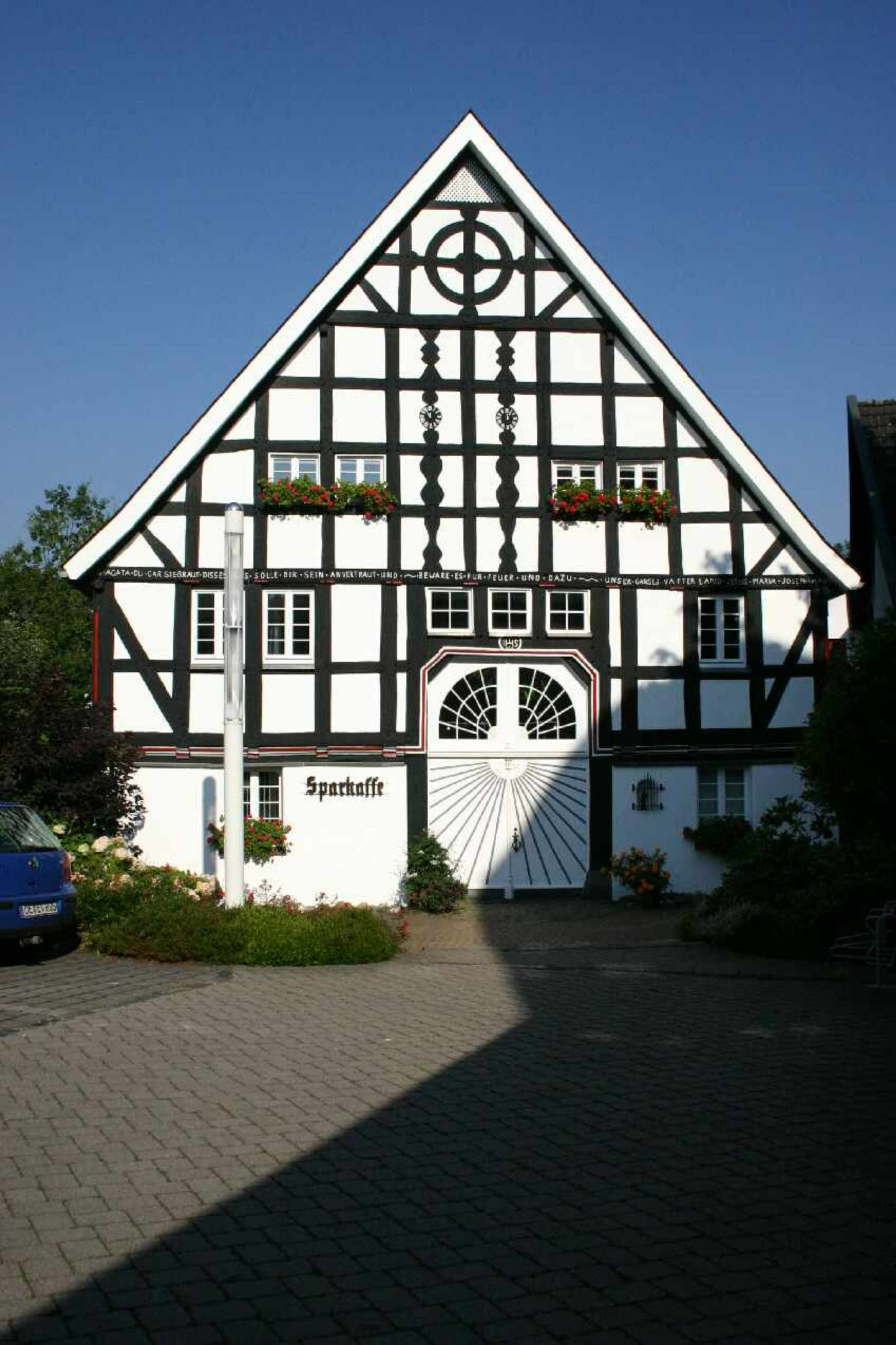 Fachwerkhaus in Lenhausen,Giebelansicht Eigenes Foto, Aufnahmedatum: 02.09.2005 Wolfgang Poguntke, Wolfgang Poguntke (talk) 18:39, 21 July 2008 (UTC)